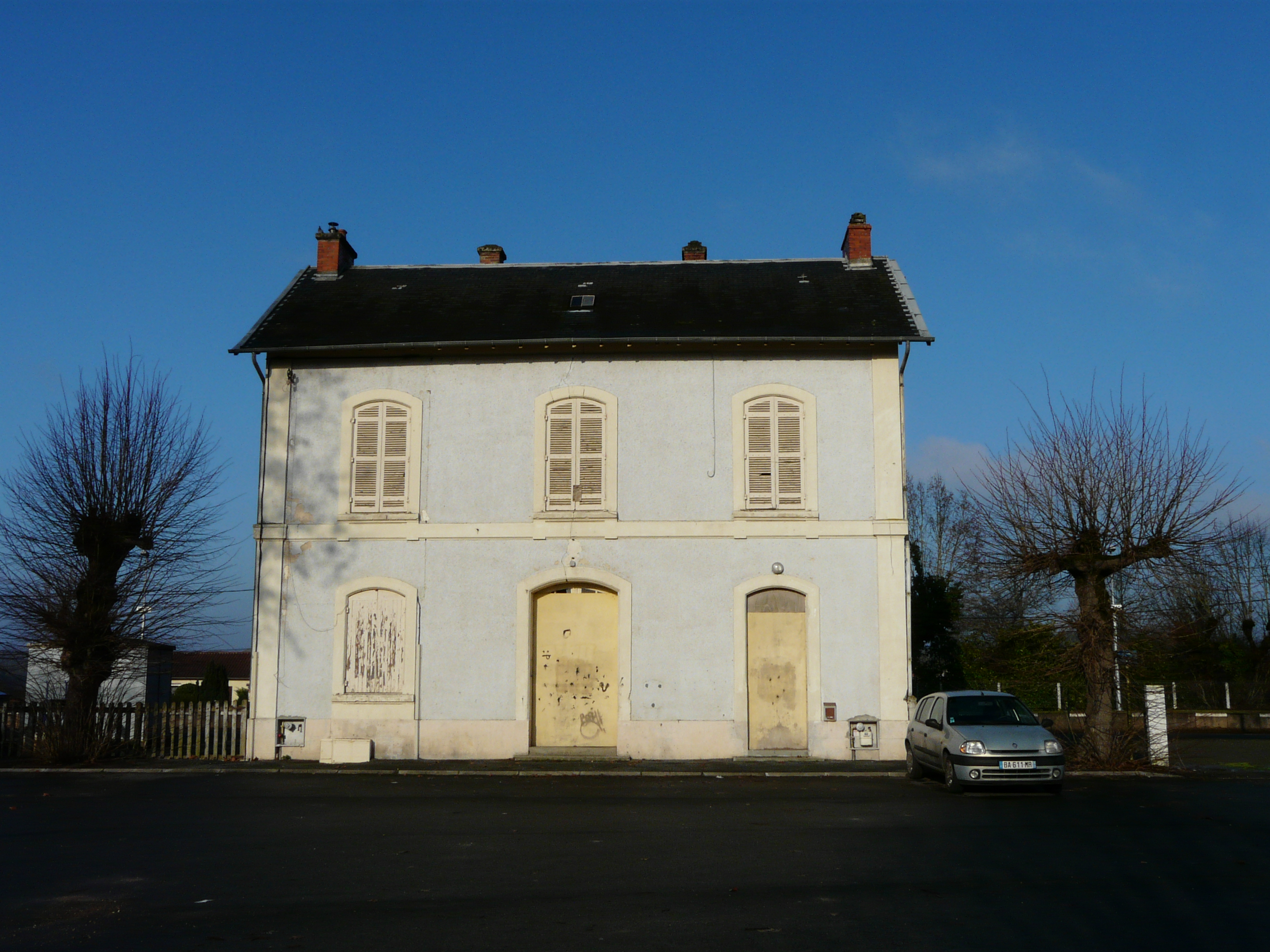 L'ancien bâtiment voyageurs de la gare de Razac, Razac-sur-l'Isle, Dordogne, France.